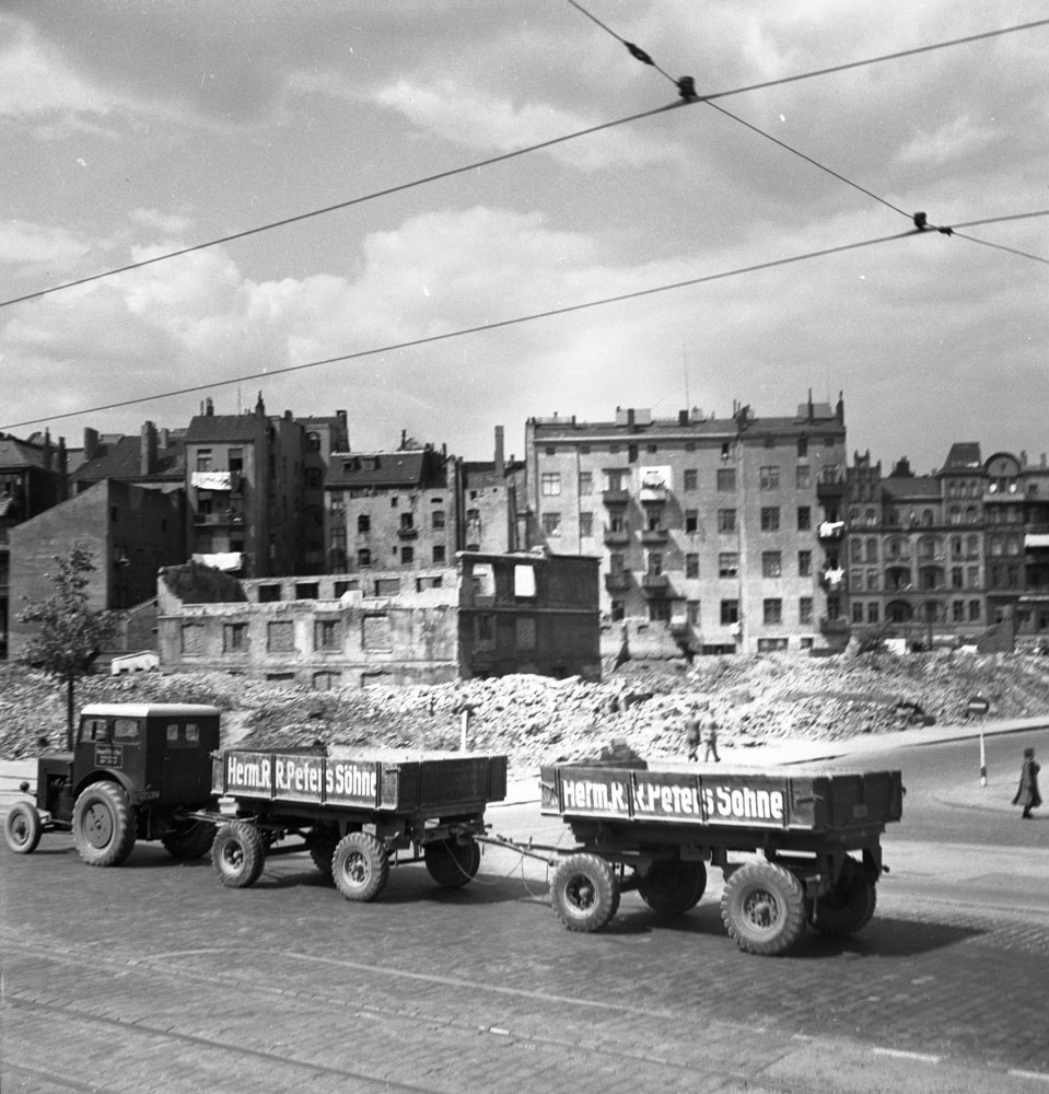 Traktor med släp i Hamburg. I bakgrunden bombade hus. tag: Photograph by: Goliath, Sven Date: 1950 Photo Nr: 2219-B404